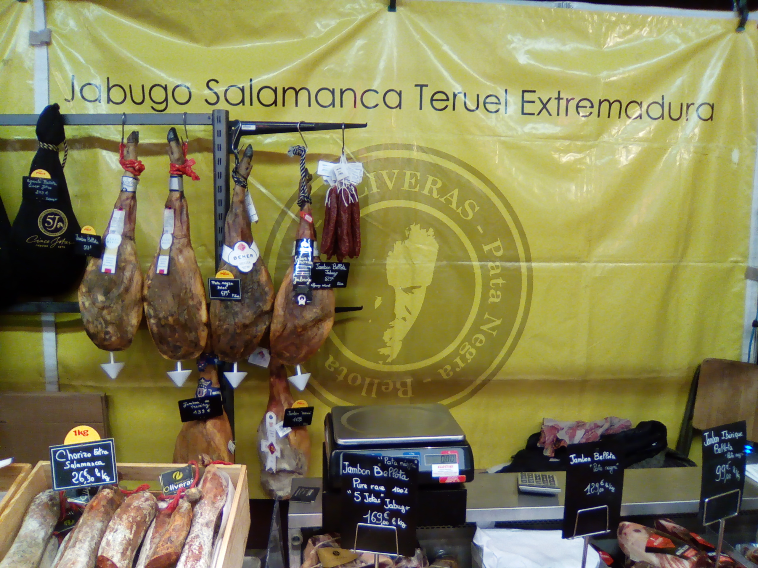 Salon saveurs des plaisirs gourmands.